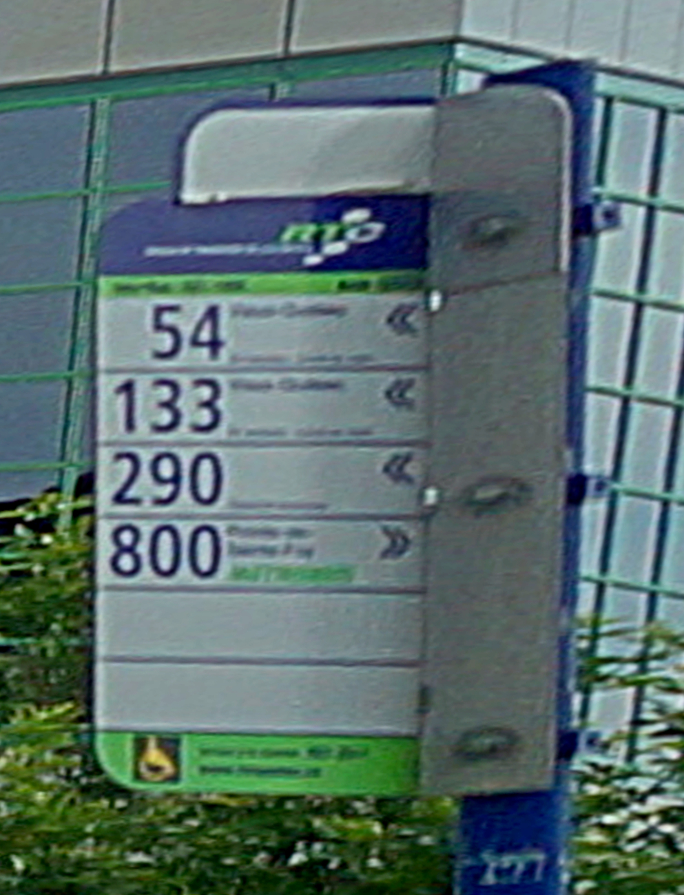 Panneau d'arrêt de la station Gare du Palais du Réseau de transport de la Capitale, surmonté d'une languette indiquant un arrêt de parcours à arrêts limités